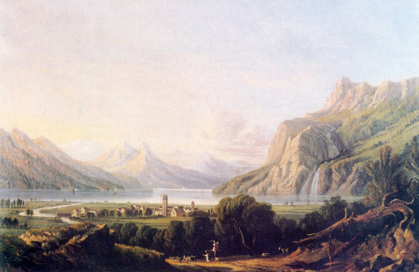 Walenstadt um 1800